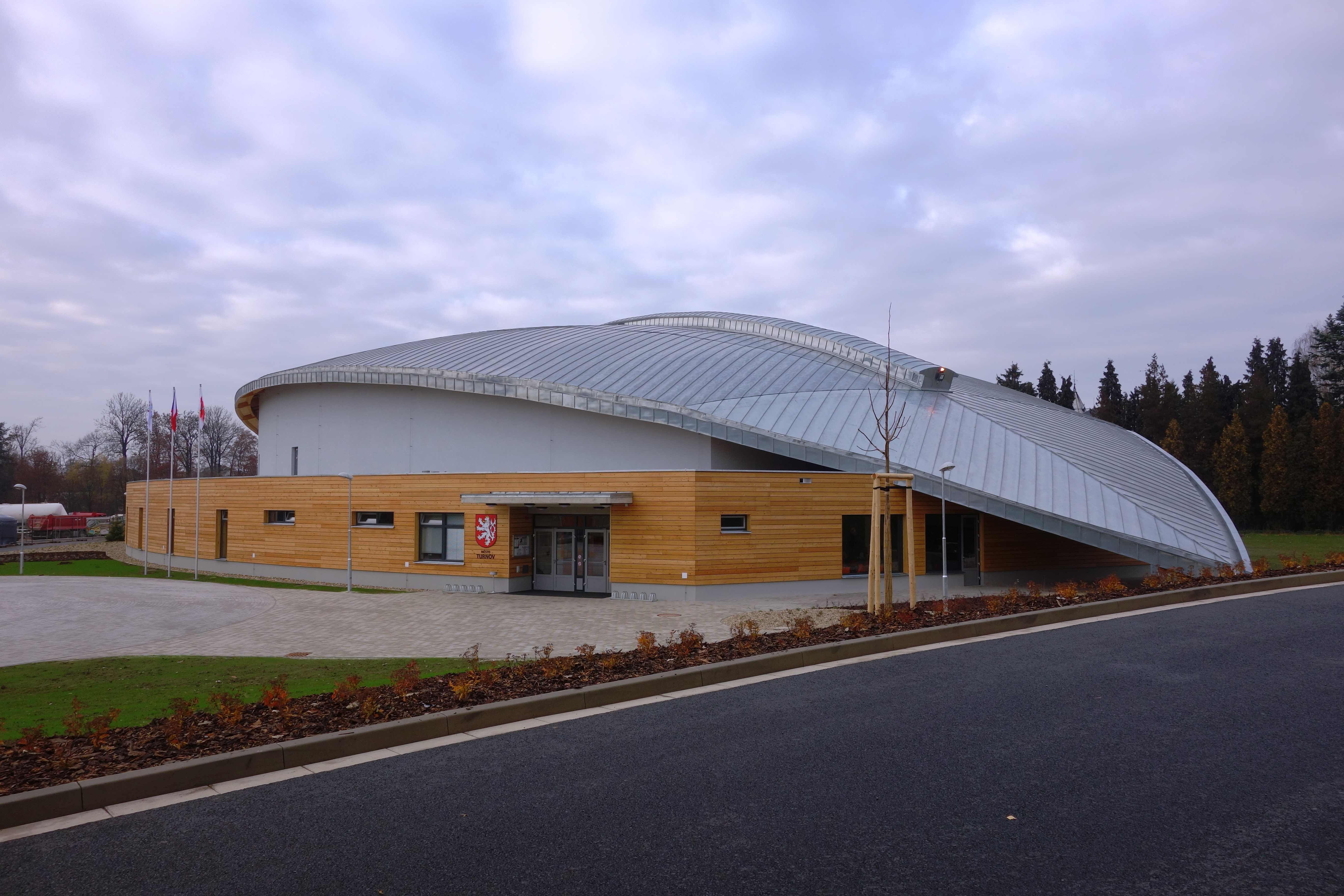 Stadion Ludvíka Koška Turnov